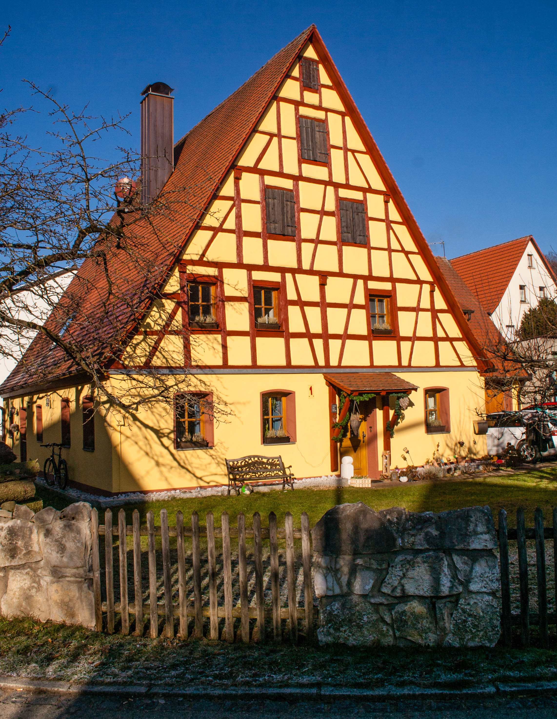 Wohnstallhaus, Massiver eingeschossiger Steilsatteldachbau mit Fachwerkgiebel, erste Hälfte 19. Jahrhundert, Entenberg, Friedenstraße 1, Leinburg